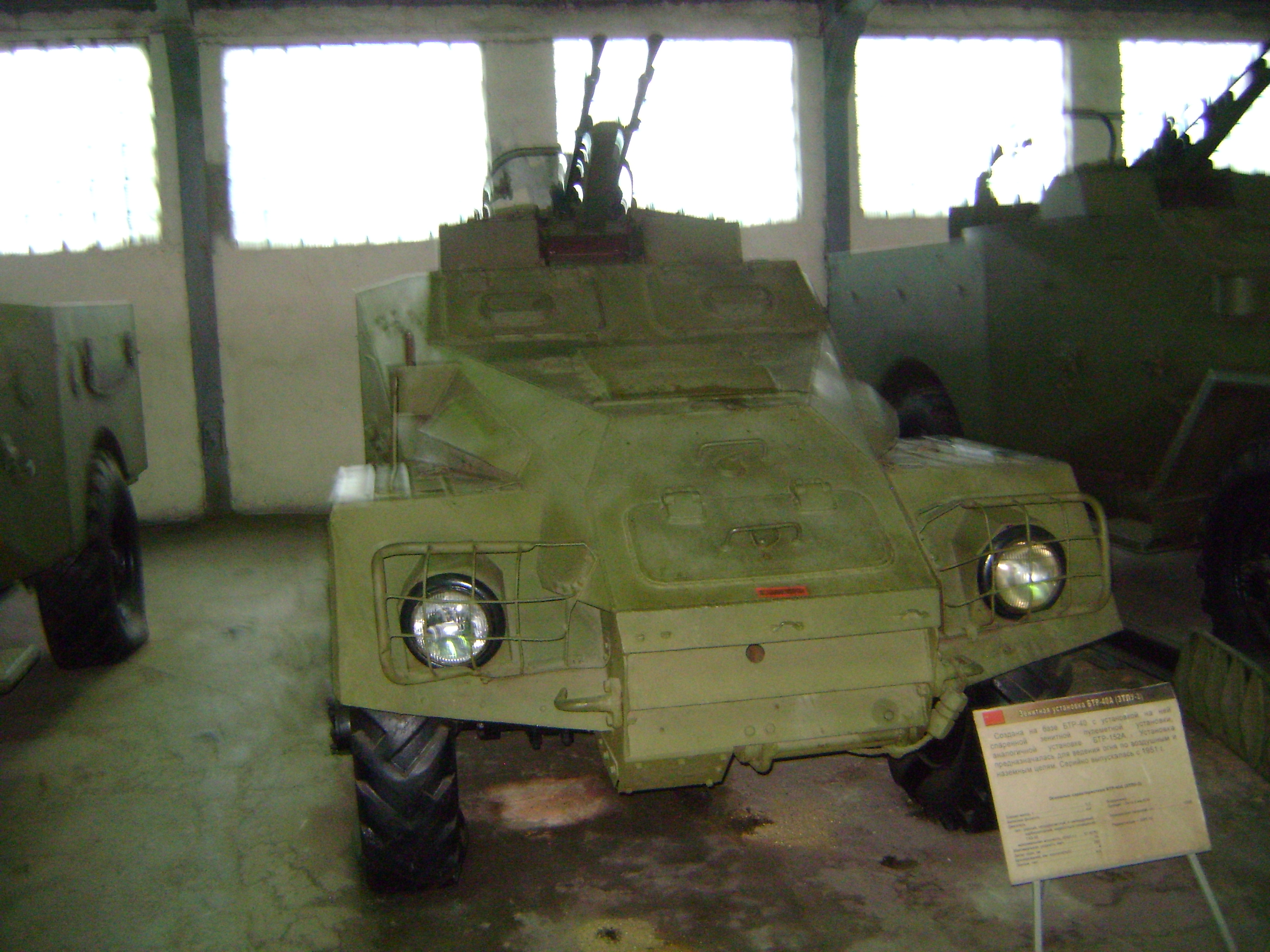 Tank Museum, Kubinka